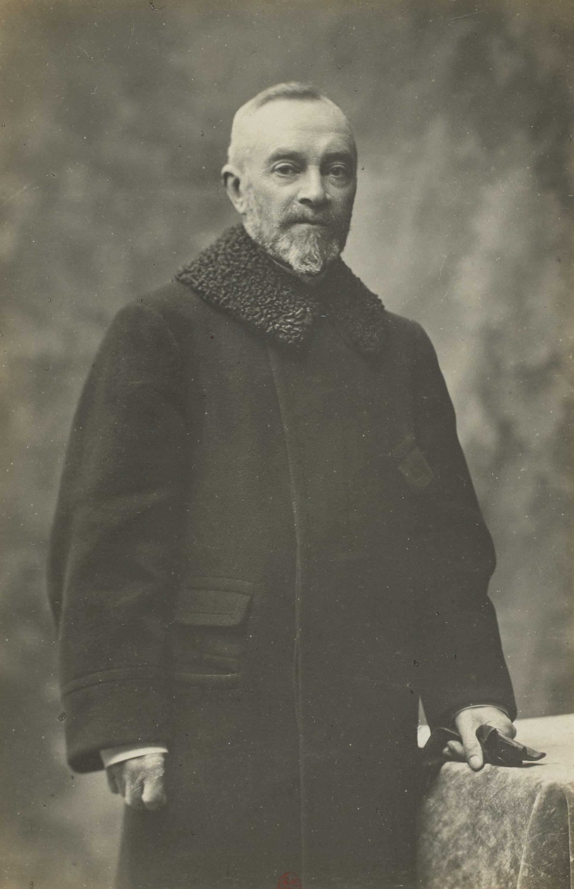 Exposition universelle de 1900 : portrait de Astère Vercruysse de Solart.